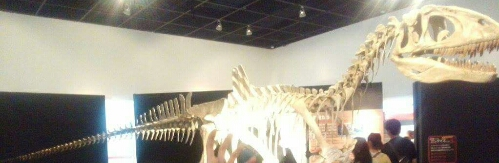 コンカヴェナトル